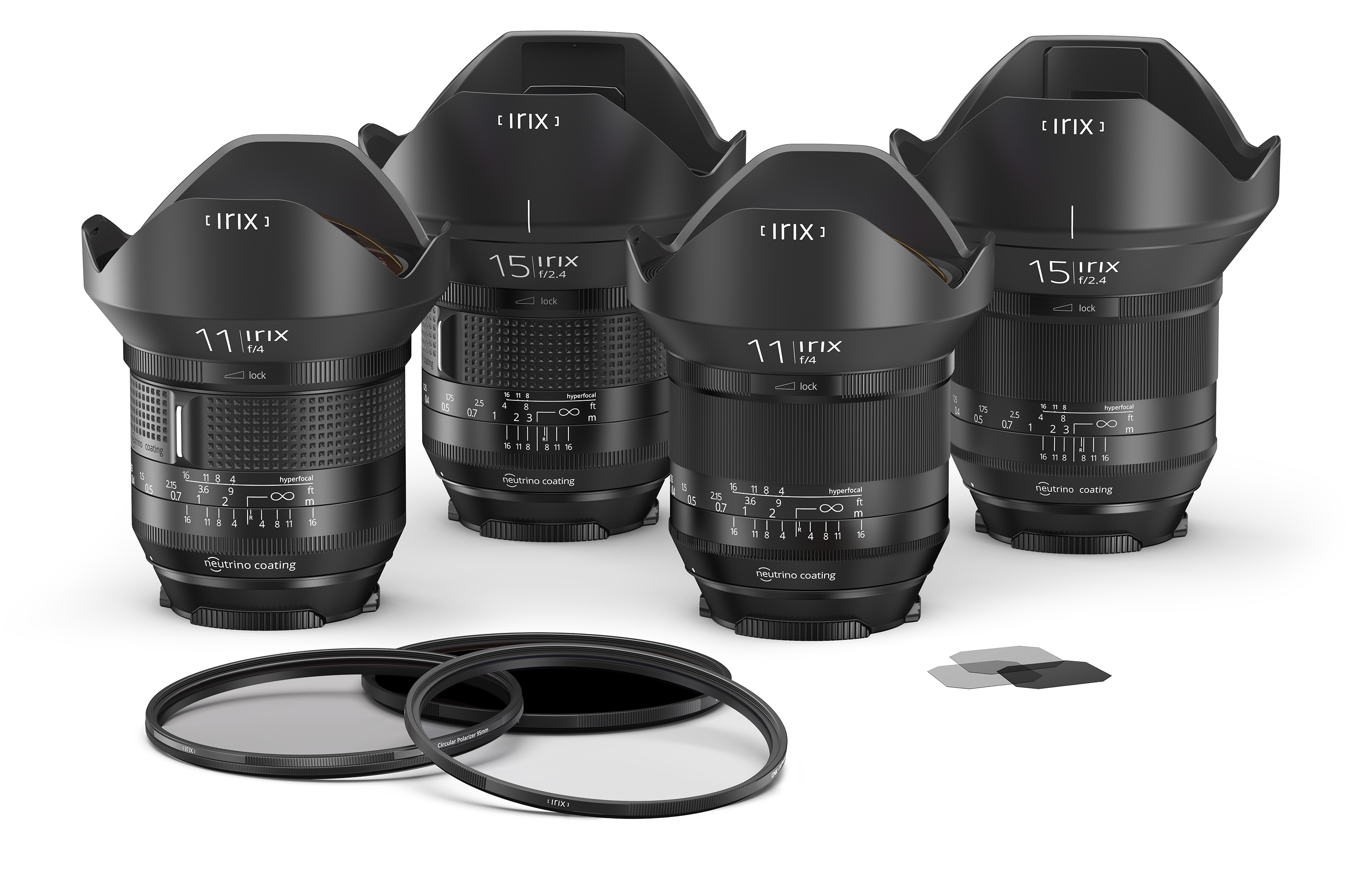 Obiektywy 11mm i 15mm, filtry